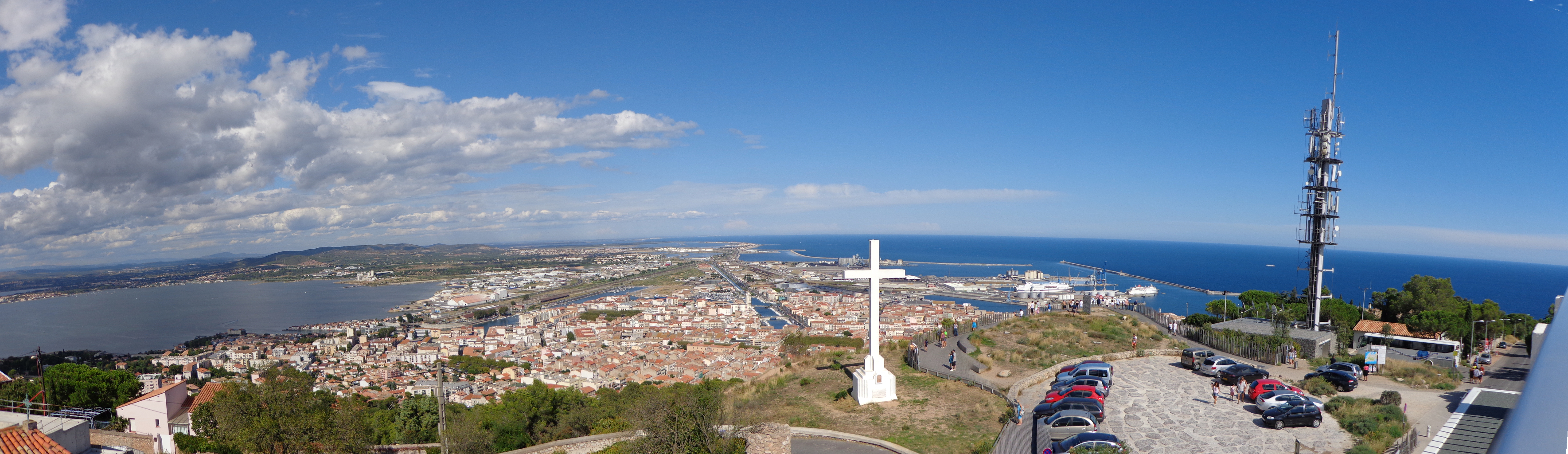 Sète (Hérault) - panorama vu de Saint-Clair - au loin, Frontignan